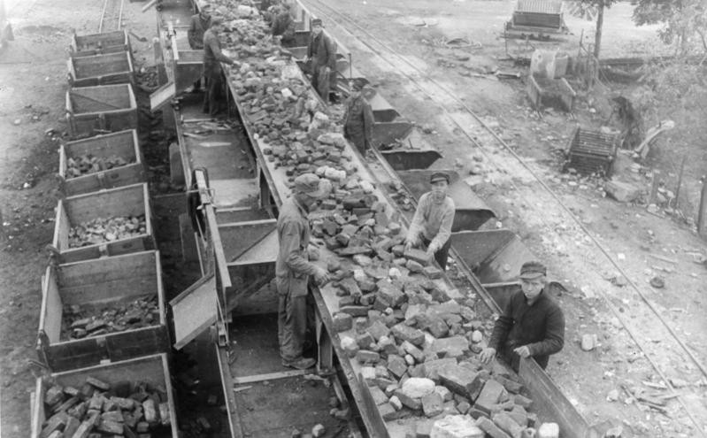 Frankfurt/Main, Sortierung von Trümmersteinen Trümmerverwertung in Frankfurt/Main Bild zeigt: Arbeiter am Fliessband der Vorsortiermaschine. Foto: EDU-Illus 993-47